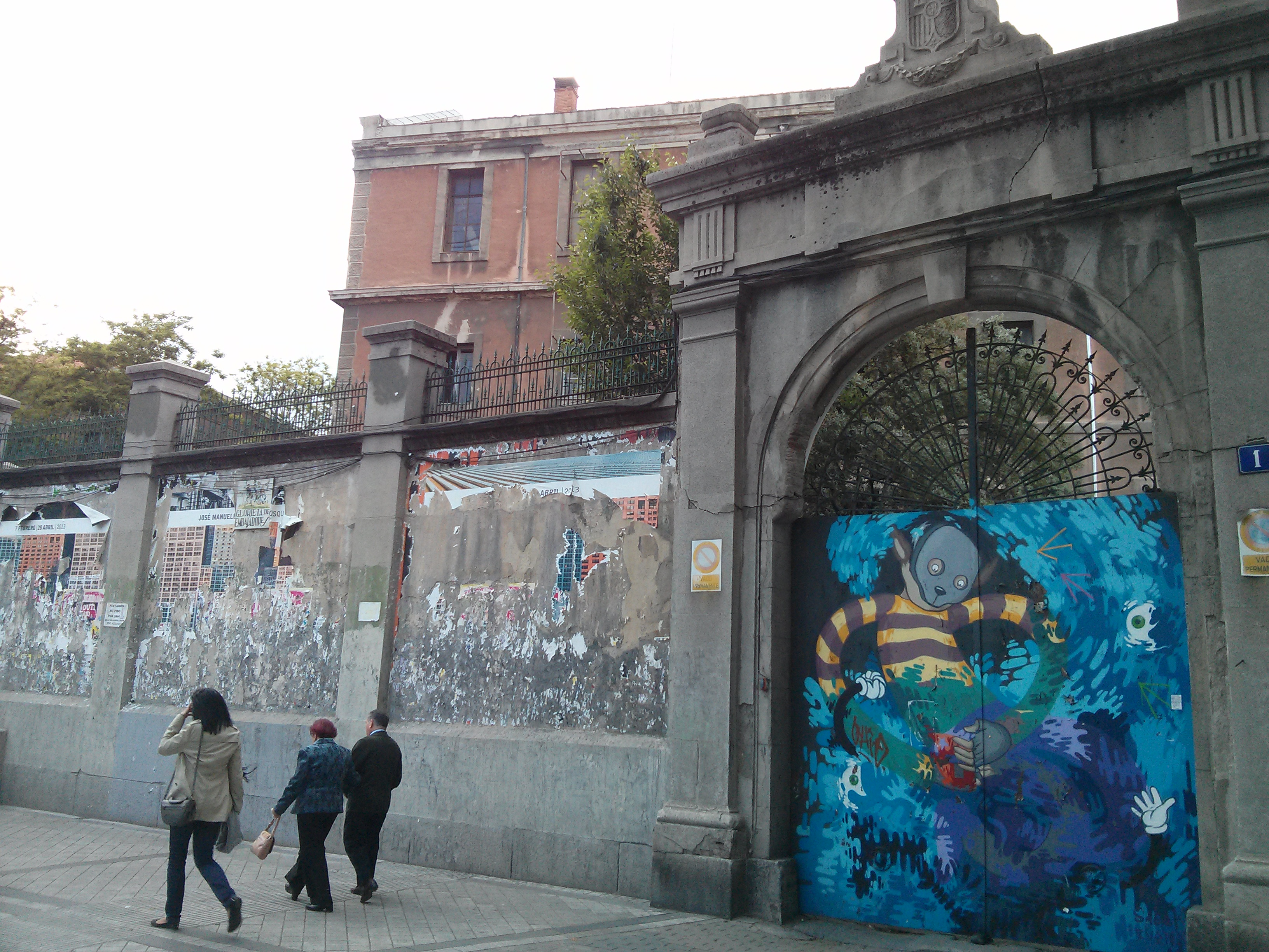 Foto del CSA Tabacalera de Madrid (España). Tomada desde la plaza Embajadores. Se ve parte del edificio y el muro del patio interior, así como un graffiti realizado por gente que colabora en el centro.